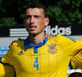 Ігор Дуць у фіналі Турніру пам'яті Валерія Лобановського 2015